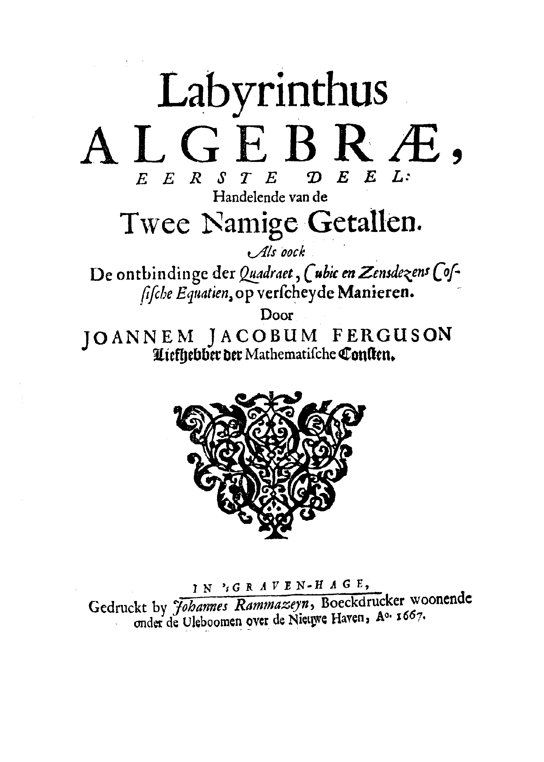 Labyrinthus algebrae, verdeelt in vijf deelen, … Door Joannem Jacobum Ferguson, …. - In's Gravenhage : gedruckt voor den Autheur, en zijn te bekomen by Johannes Tongerlo, en Iacob Scheltus, beyde wononde inde Venestraet, 1667. - [8], 212 [i.e. 216] p. ; 4º. - STCN ppn 079530206 .